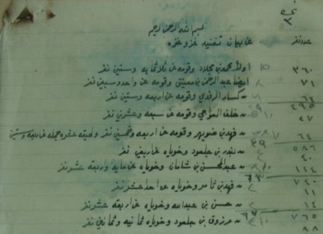 وثيقة مصورة تبين مشاركة وقيادة الشيخ فهد بن ظويهر في معركة السبلة التي حدثت في 30 مارس 1929.